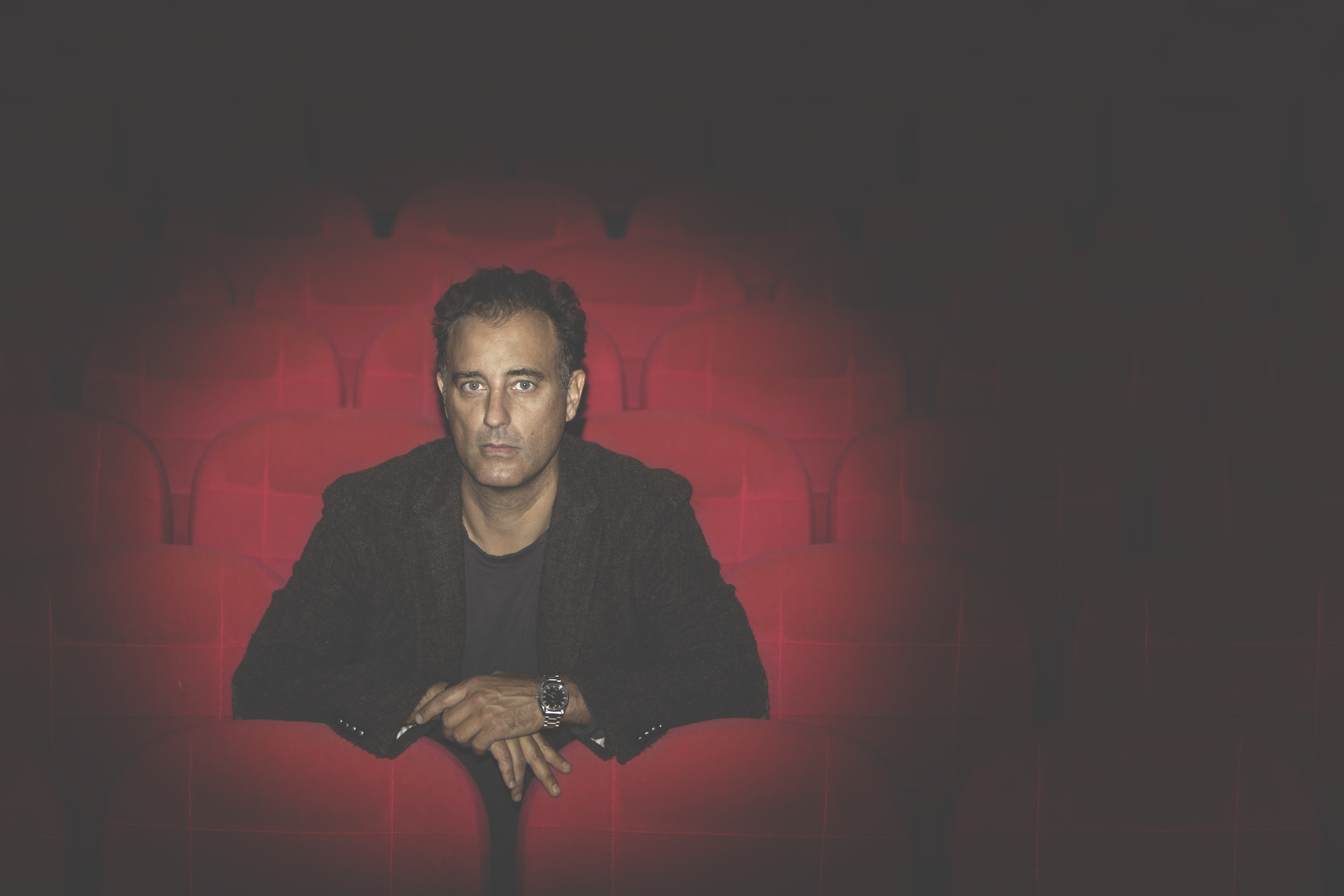 photo